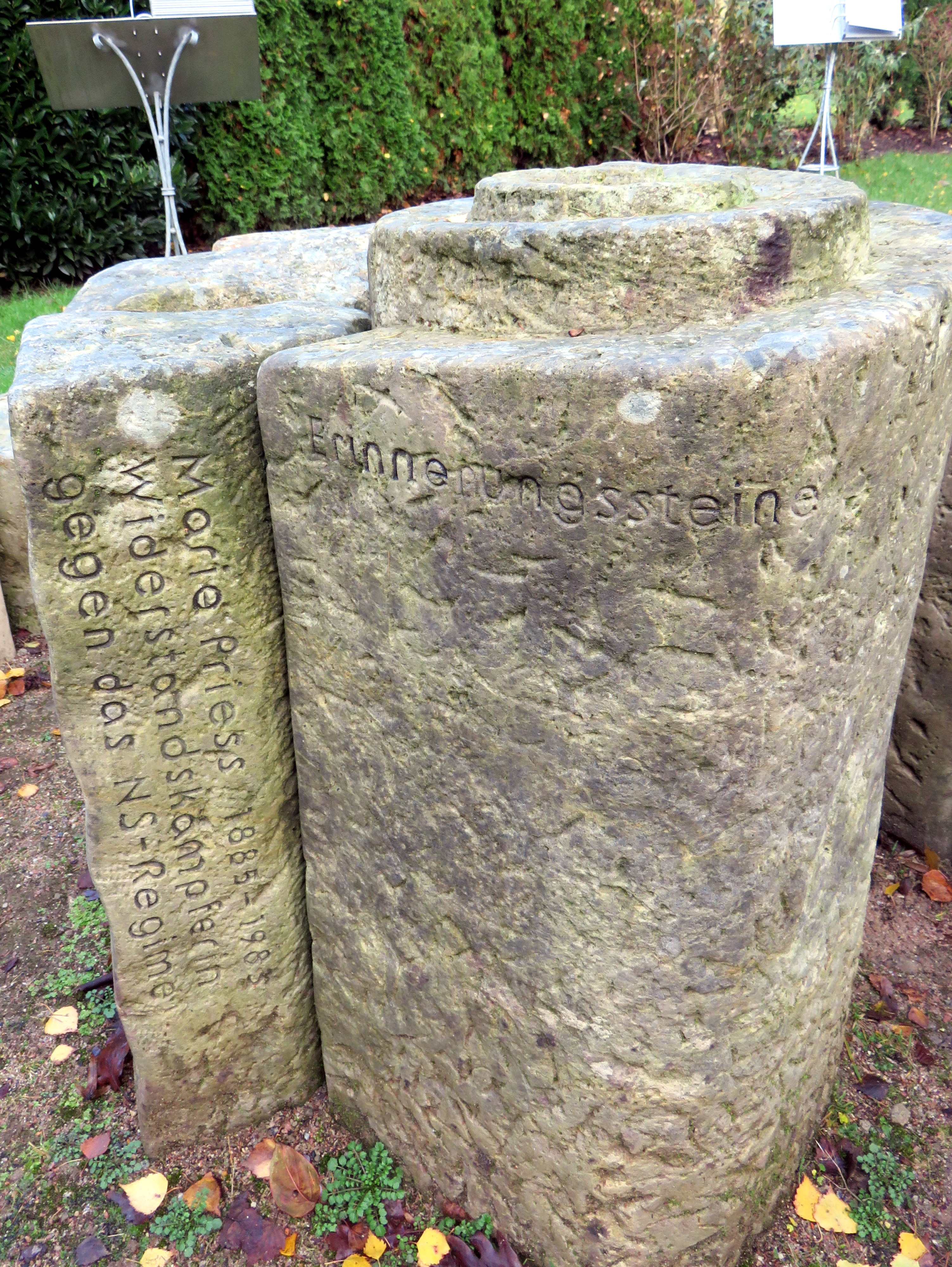 Gedenkstein für die deutsche NS-Widerstandskämpferin Marie Priess in der Erinnerungsspirale im Bereich des Gartens der Frauen auf dem Ohlsdorfer Friedhof in Hamburg-Ohlsdorf, .